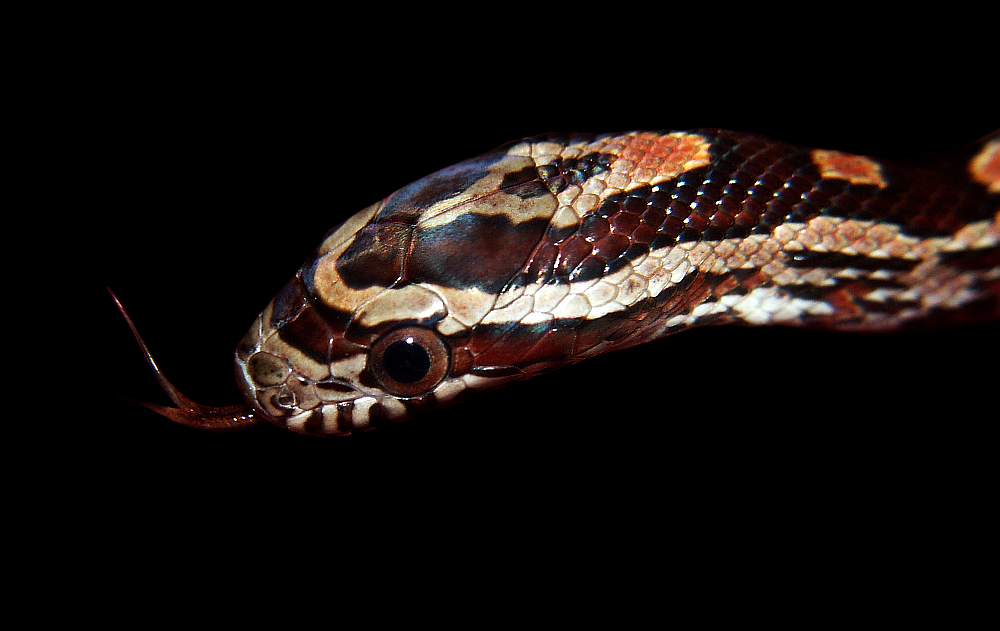 Kopfprofil einer juvenilen Kornnatter (Pantherophis guttatus)